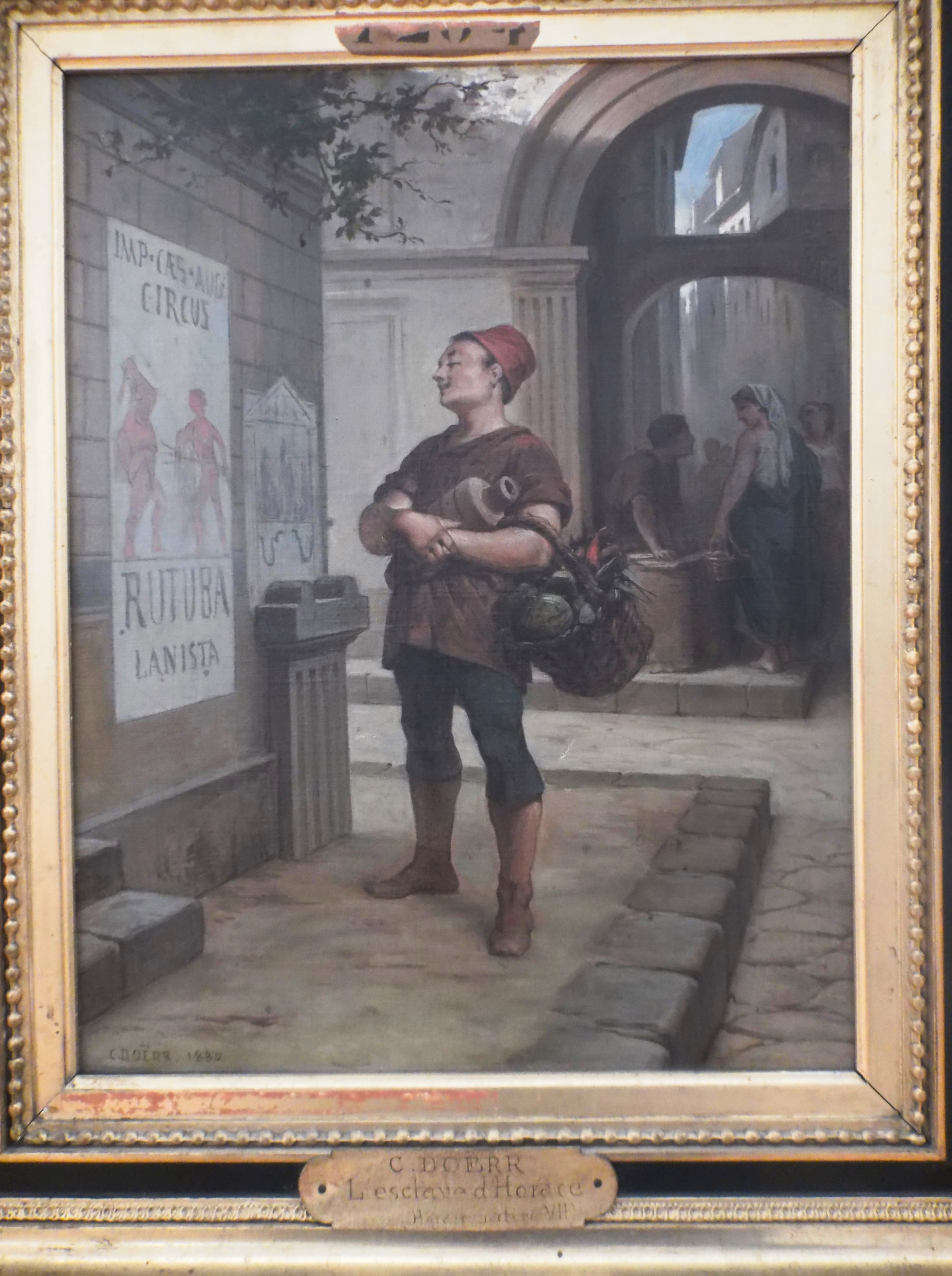 L'esclave d'Horace. Toile du peintre français Charles Doerr (1815-1894). Huile sur toile, 1880. Musée d'art Roger-Quilliot, Clermont-Ferrand (France). Inv. 894.94.1 / 2525 / 56.36.1. Tableau acquis à la loterie de l'exposition de Clermont-Ferrand en 1880.